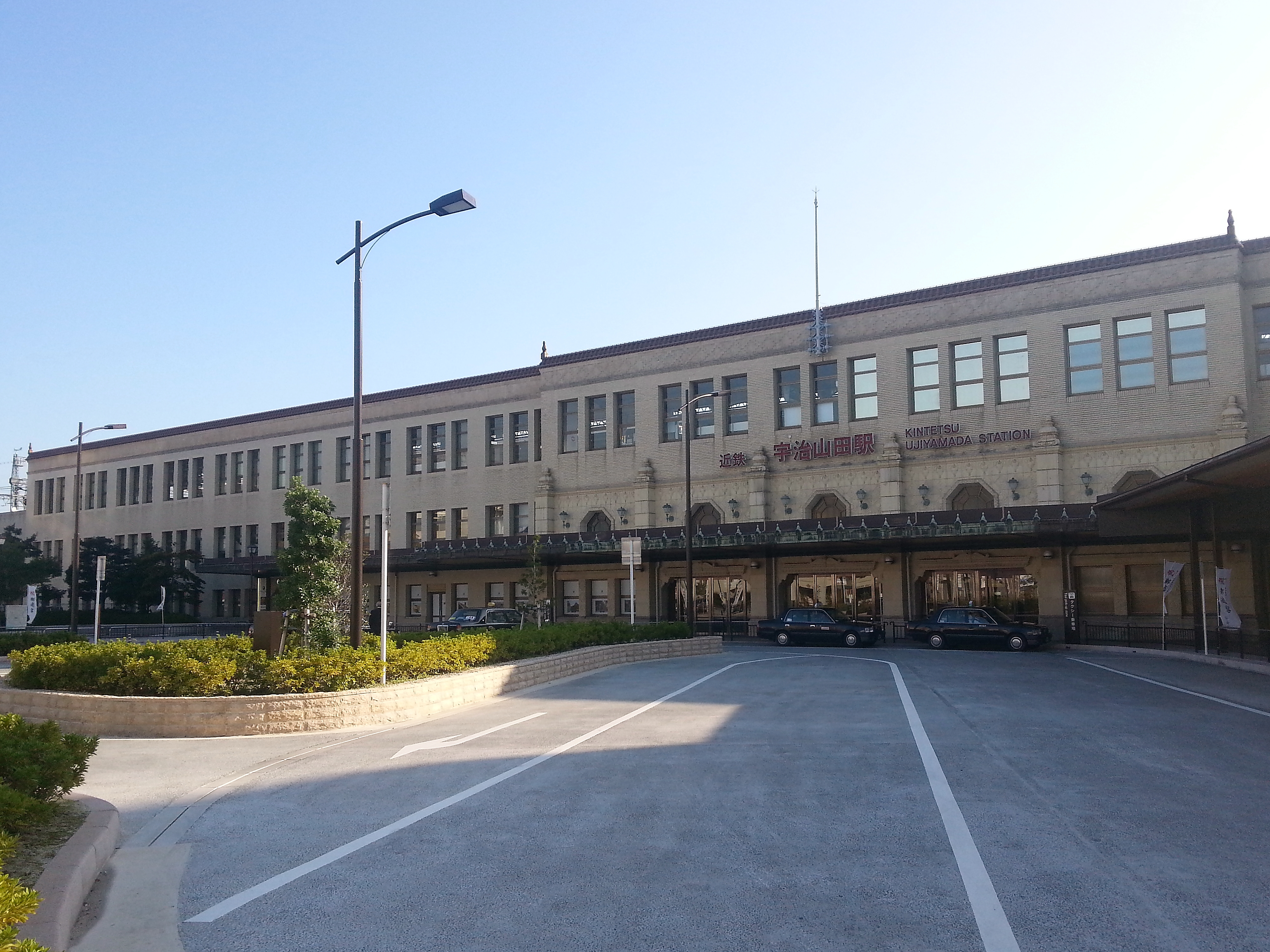 近鉄 宇治山田駅